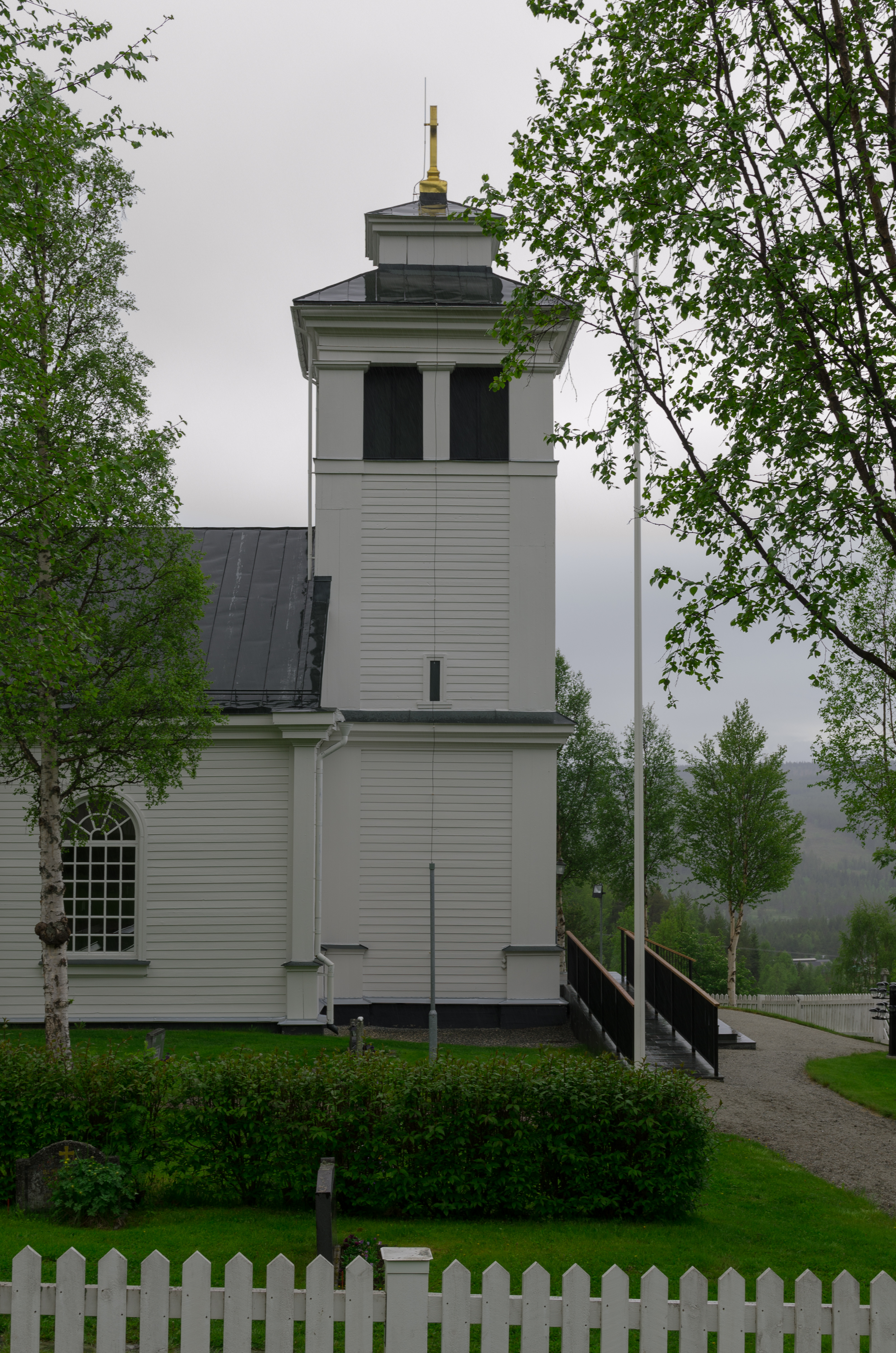 Tännäs kyrka